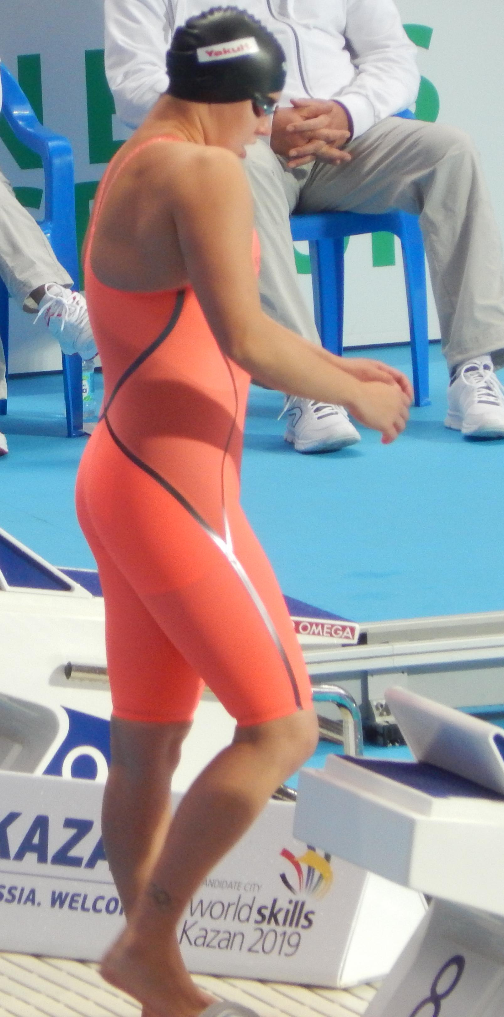 Тьяша Возел на чемпионате мира в Казани